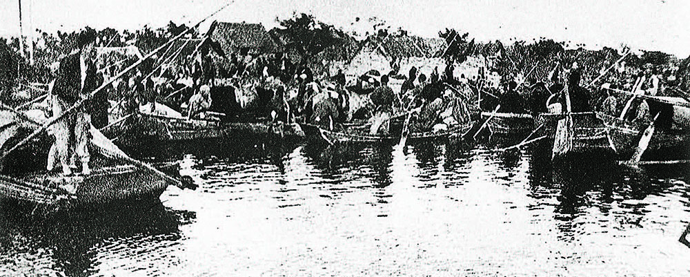 1941年微山湖游击队成立